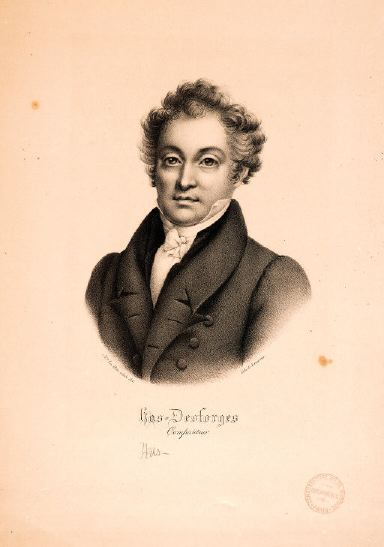 Pierre-Louis Hus-Desforges (1773-1838)